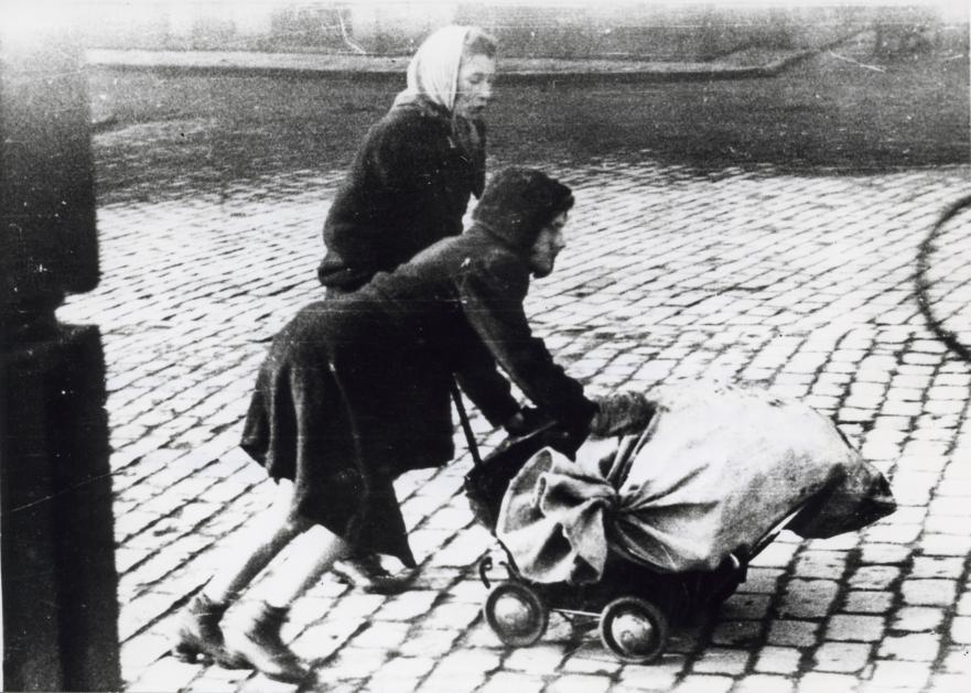 Nationaal Archief / Spaarnestad Photo, SFA002008929 Op hongertocht met een zak eten op een kinderwagentje tijdens de hongerwinter van de Tweede Wereldoorlog. Nederland, 1944. Collectie Spaarnestad Voor meer informatie en voor meer foto’s uit de collectie van Spaarnestad Photo, bezoek onze Beeldbank: U kunt ons helpen onze kennis van de fotocollecties te verrijken door tags en commentaren toe te voegen. Herkent u mensen of locaties of heeft u een bijzonder verhaal te vertellen bij één van de foto’s, laat dan een reactie achter (als u ingelogd bent bij Flickr) of stuur een mailtje naar: You can help us gain more knowledge on the content of our collection by simply adding a comment with information. If you do not wish to log in, you can write an e-mail to